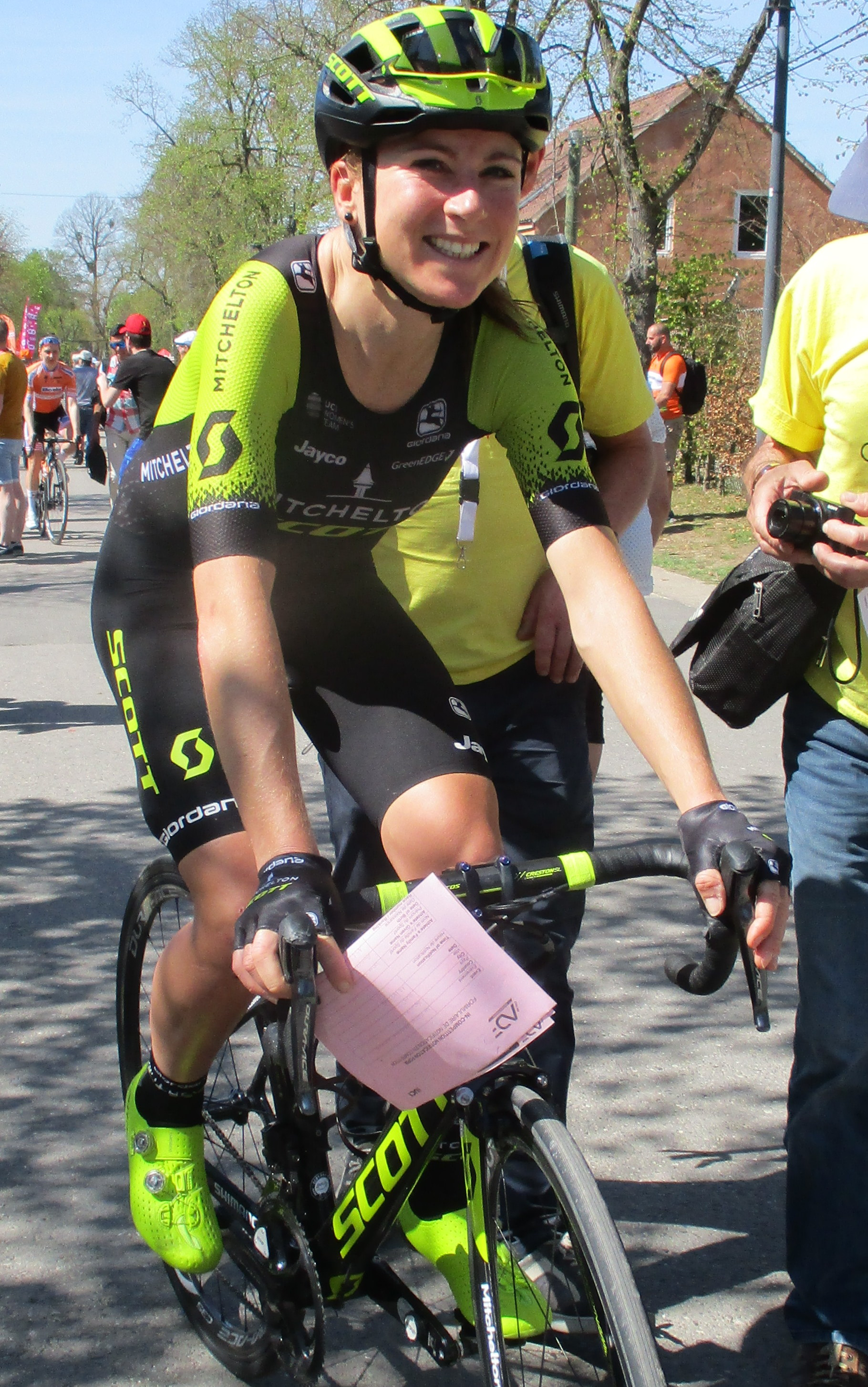 Na de finish van de Waalse Pijl 2018 op de Mur van Huy.